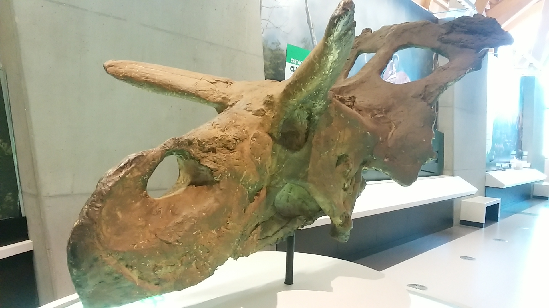 Albertaceratops nesmoi